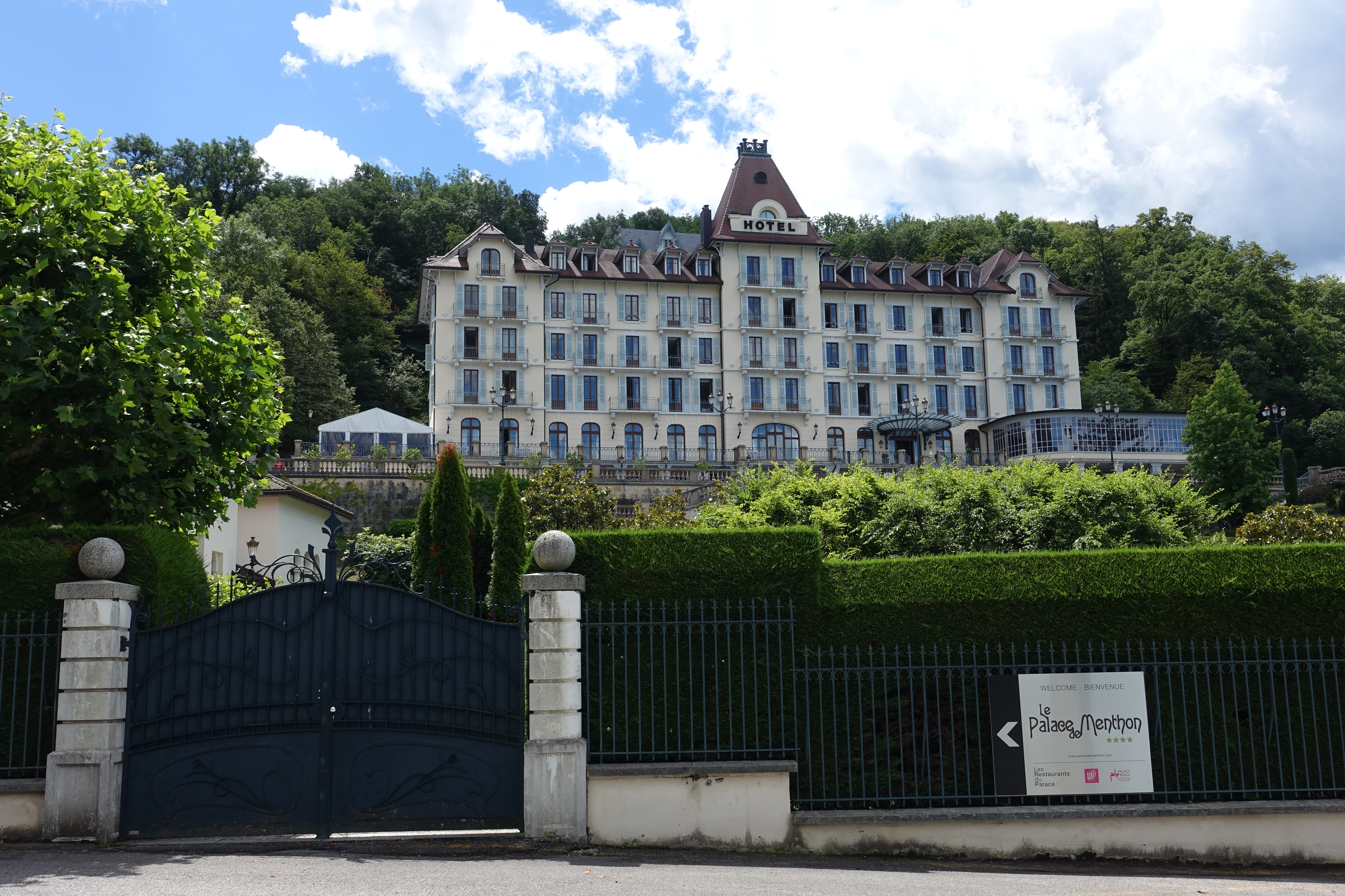 Le Palace de Menthon @ Menthon Saint-Bernard